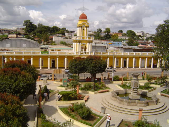 Foto del parque y de la Municipalidad